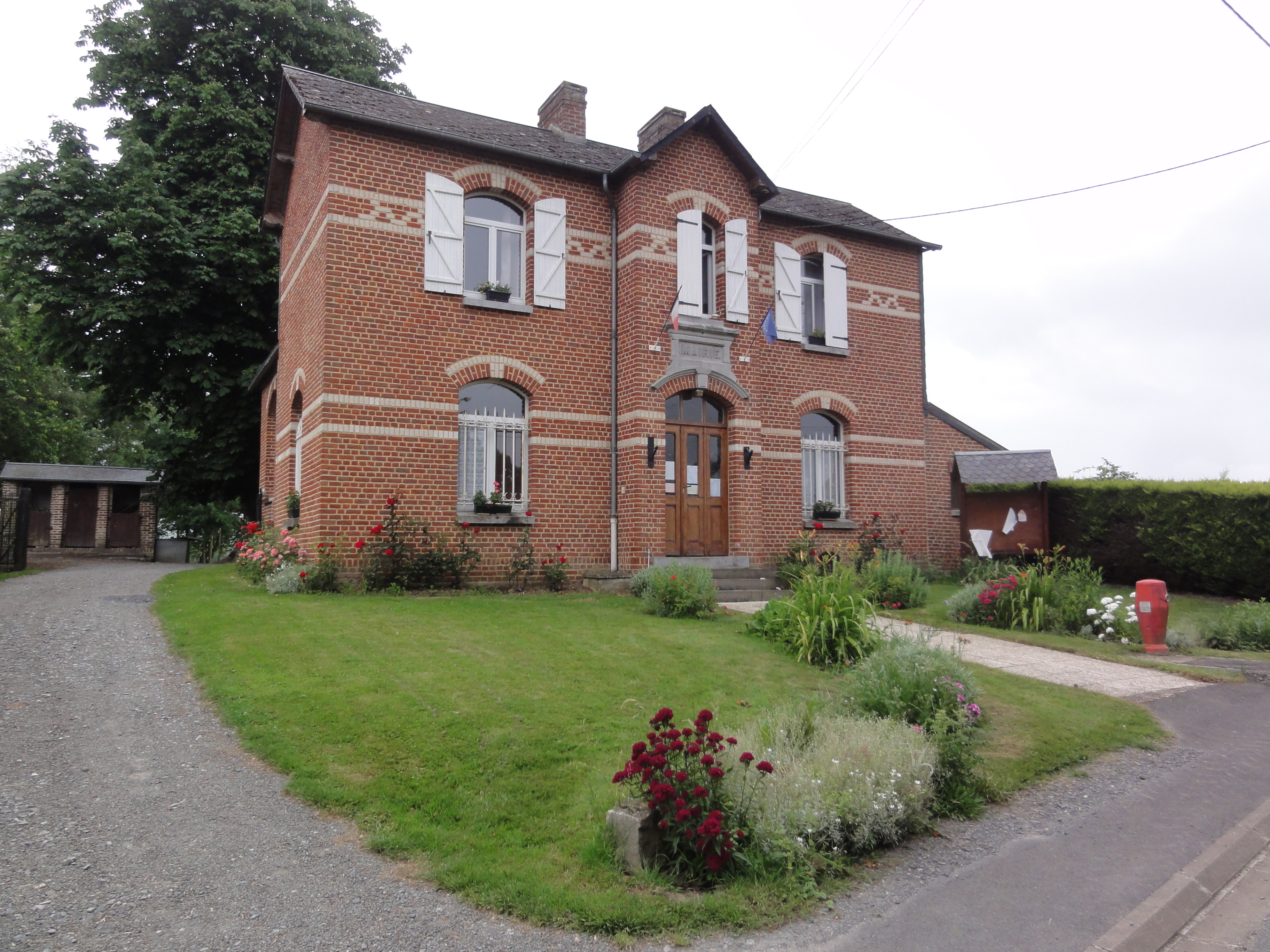 Éparcy (Aisne) mairie